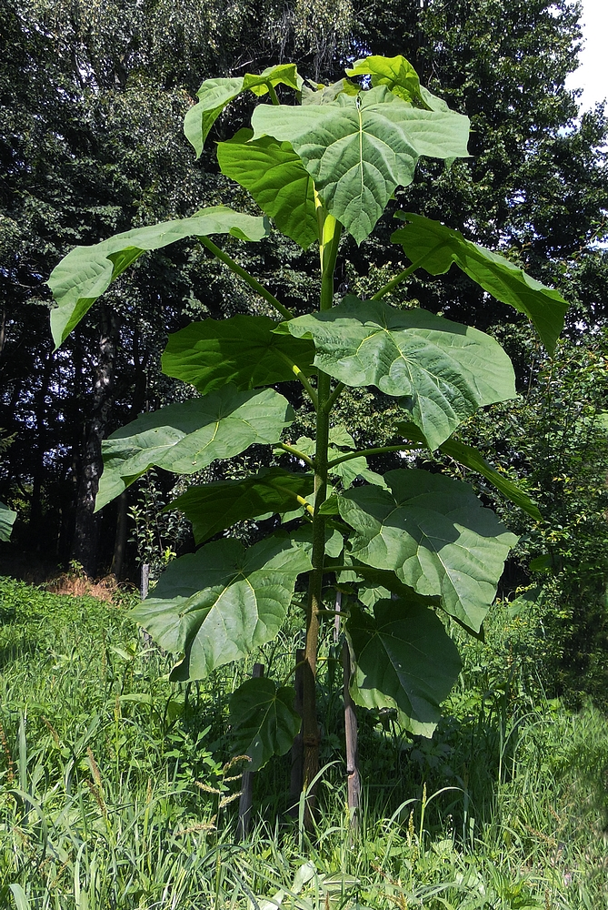 Paulownia tomentosa in Czech rep. -two years old tree